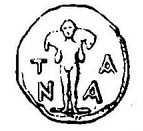 Coin of Tanagra with Hermes Kriophor. Image of statue of sculptor Kalamis